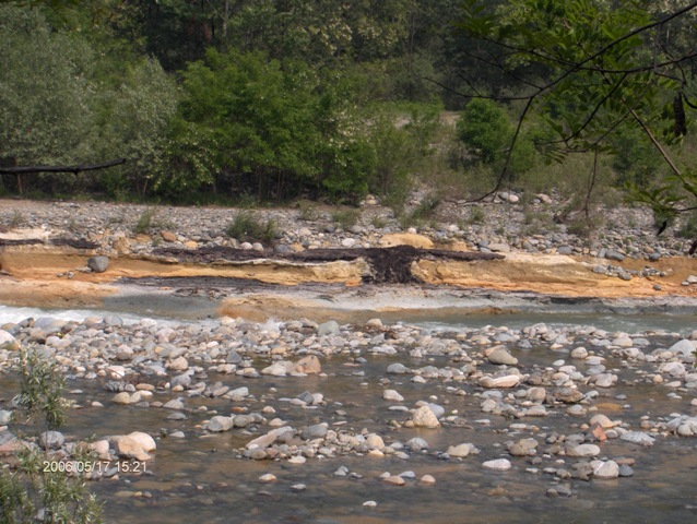 Resti vegetali fossili nell'alveo della Stura di Lanzo nei pressi di Nole e Cirié. Autore: Tapion